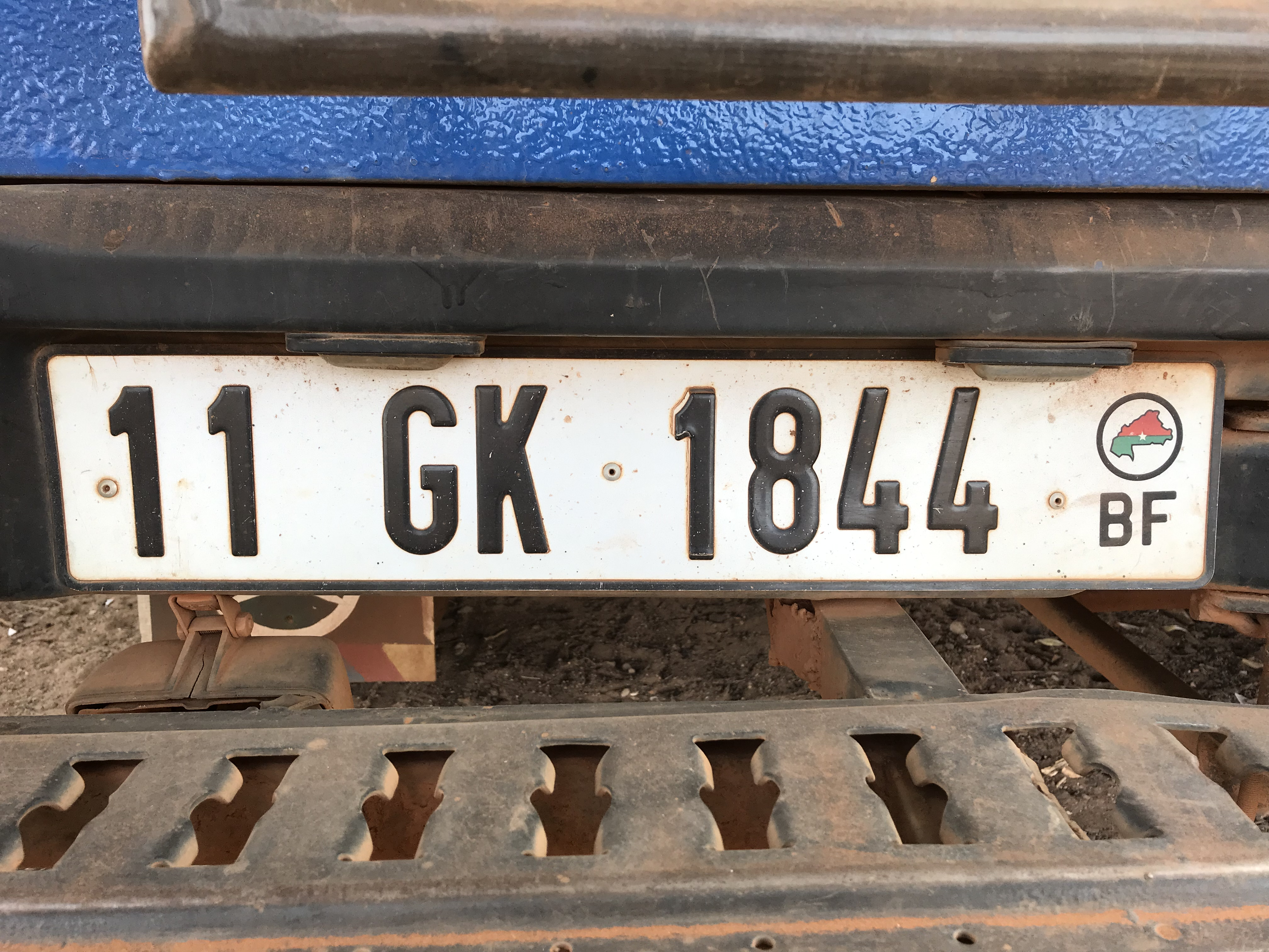 Kennzeichen eines burkinischen Fahrzeuges.